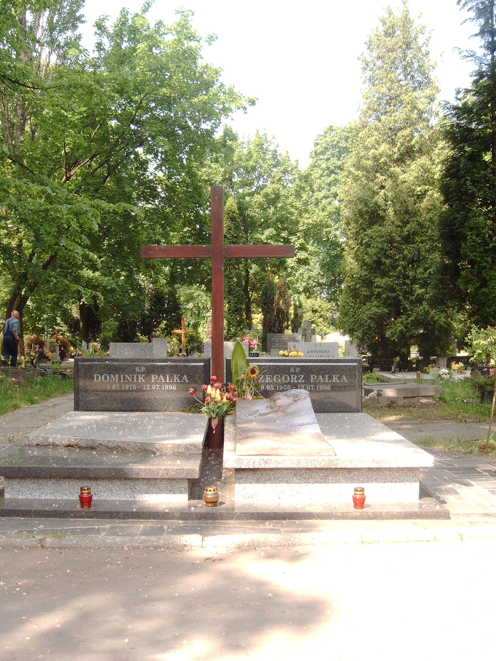 Grób Grzegorza Palki na cmentarzu komunalnym na Dołach w Łodzi